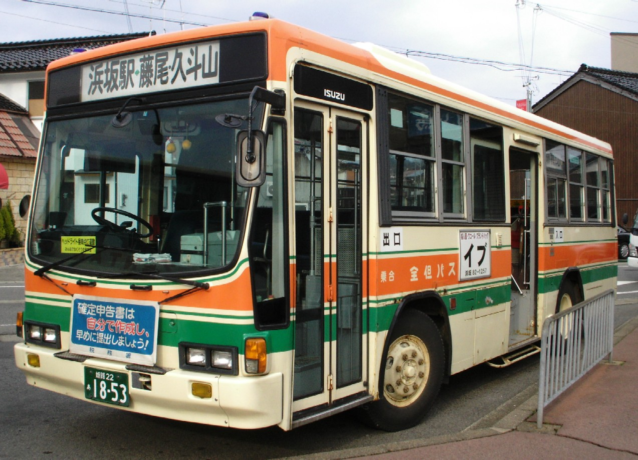 全但バス